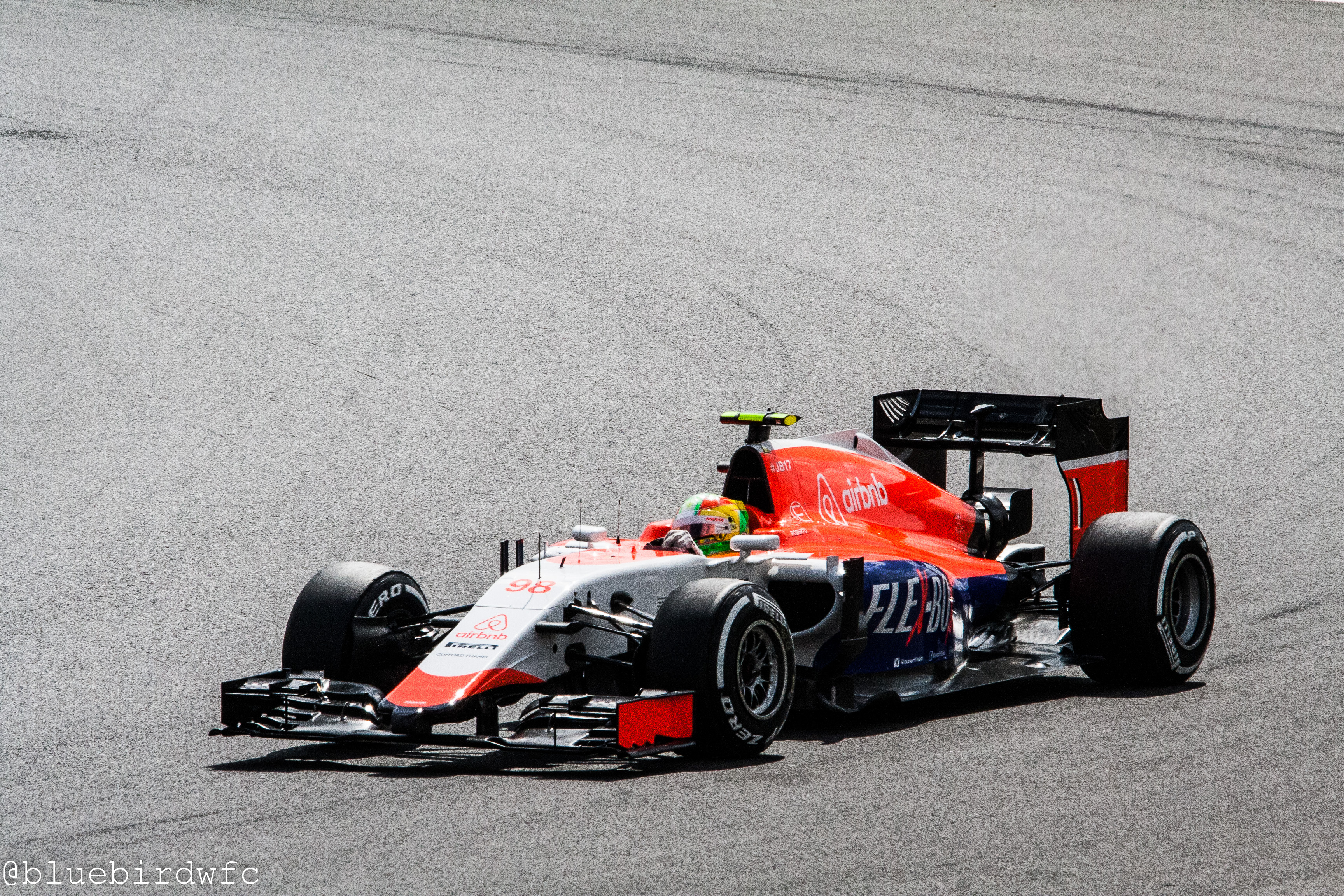 Roberto Merhi en el Gran Premio de Gran Bretaña de 2015, con el equipo Manor F1 Team